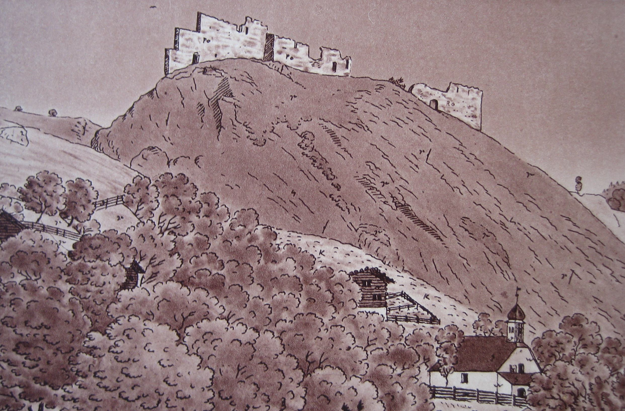 Burg Solavers, nach einer Zeichnung von J. U. Fitzi (1798 - 1855)